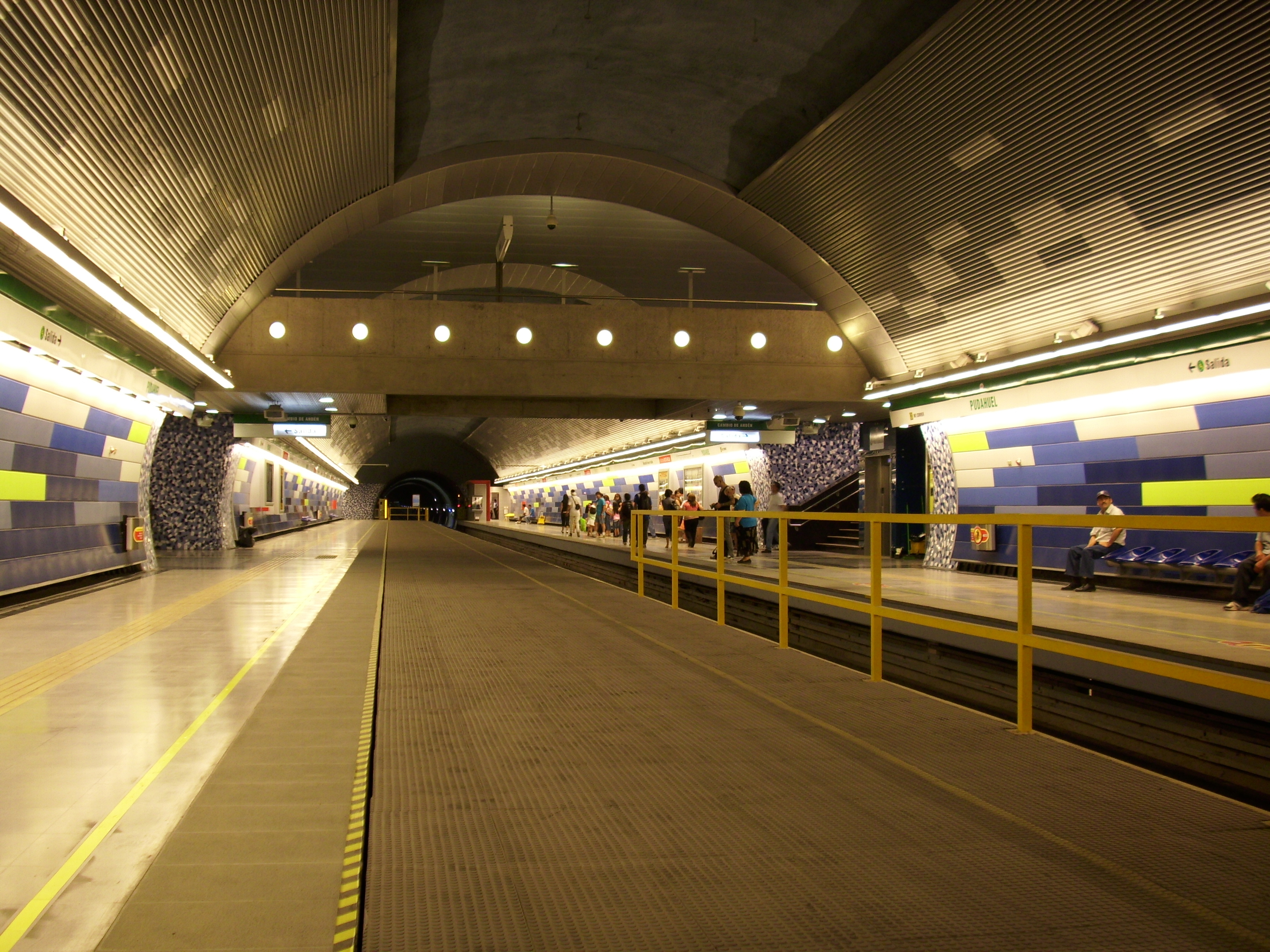 El andén de la estación Pudahuel del Metro de Santiago de Chile. 21 de febrero de 2010.